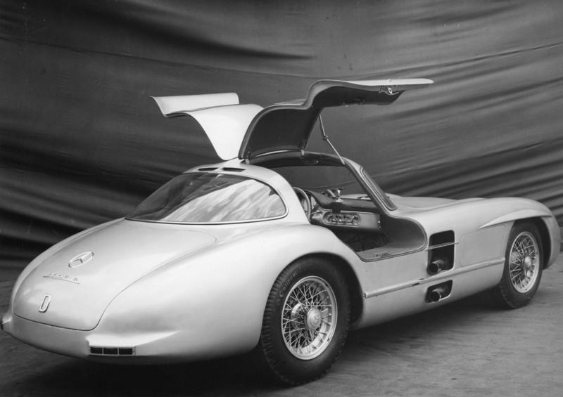 Daimler-Benz A.G. Werk Sindelfingen Typ 300 SL R, Rennsportwagen von Fangio und Moss